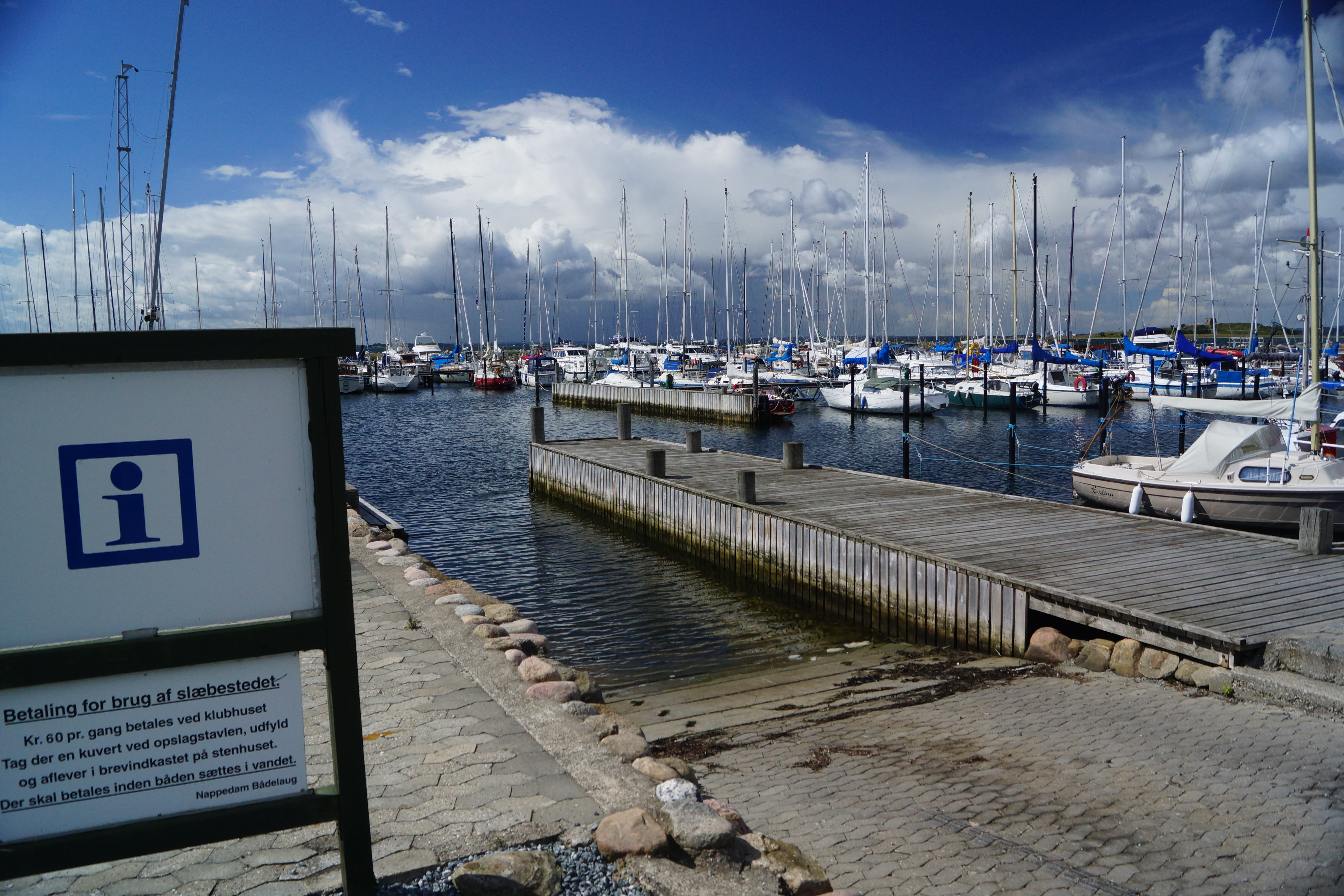 Nappedam (2)